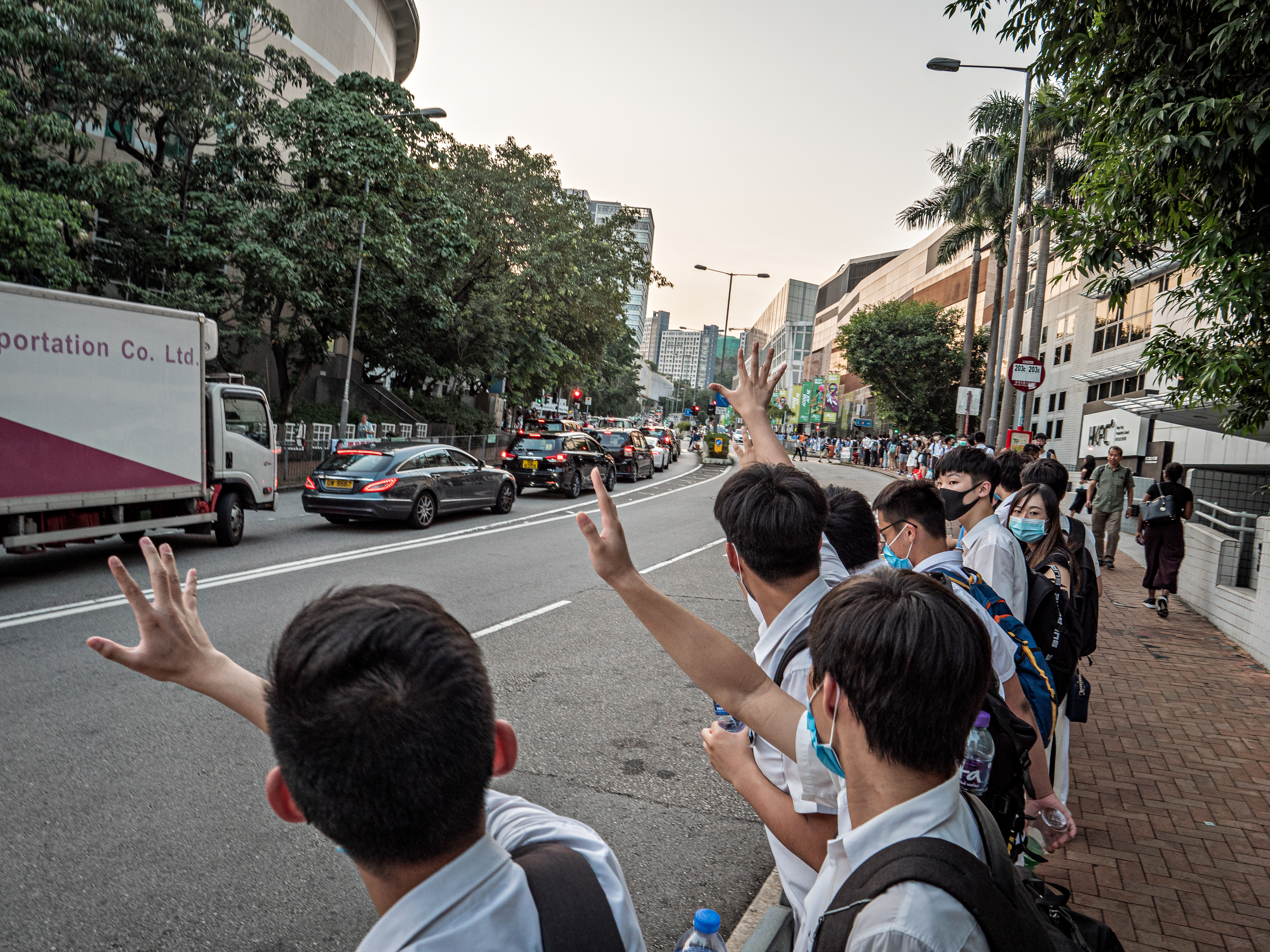 20190911 Tat Chee Avenue 達之路